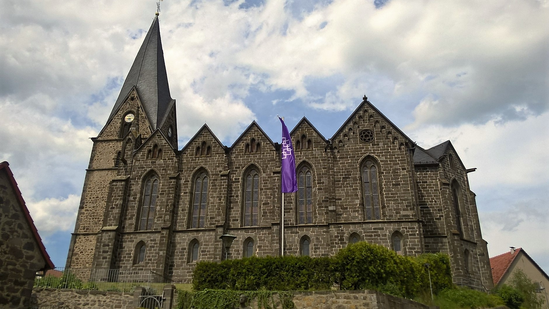 Evangelische Kirche Londorf, Rabenau, Landkreis Gießen, Hessen, Deutschland